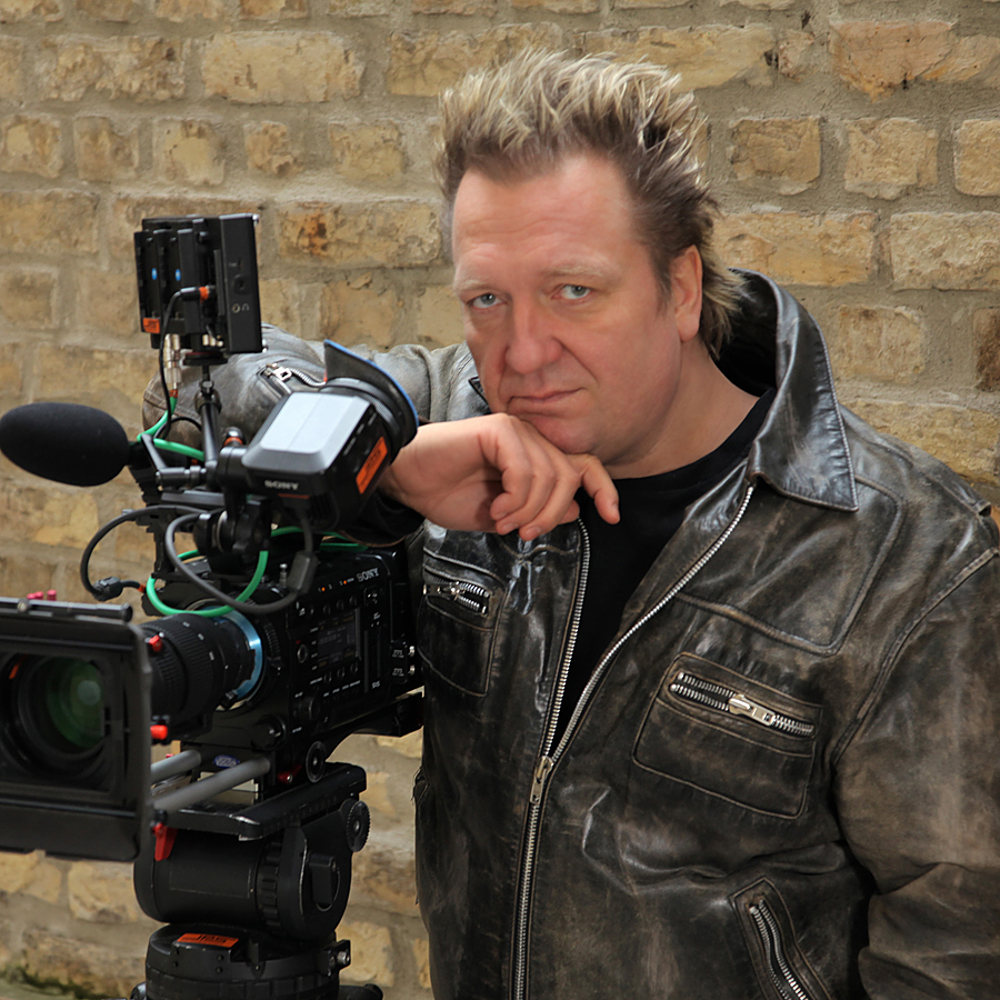 Igors Linga 2016. gadā